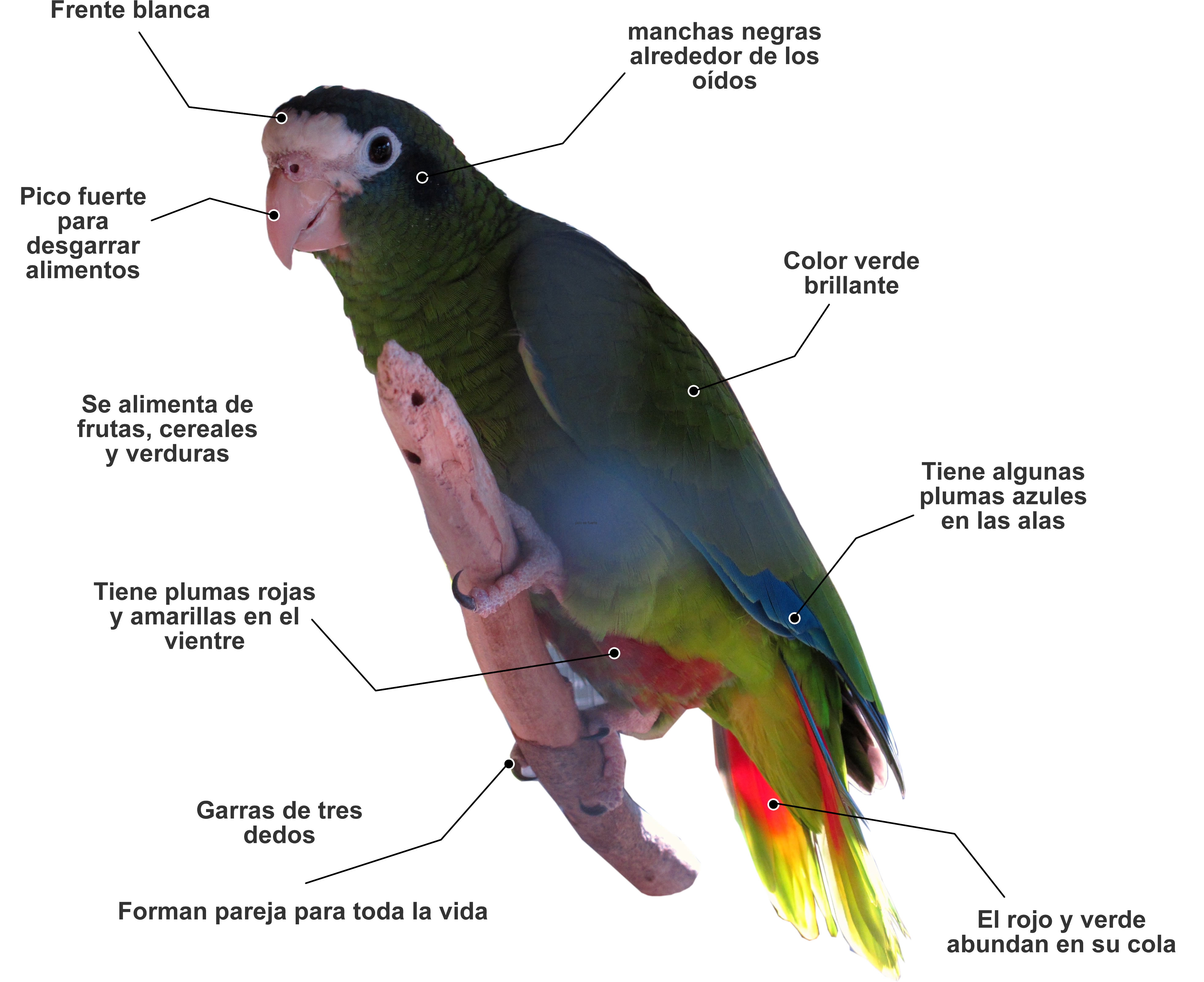 Infografia de Amazona ventralis basada en imagen CC de wikipedia